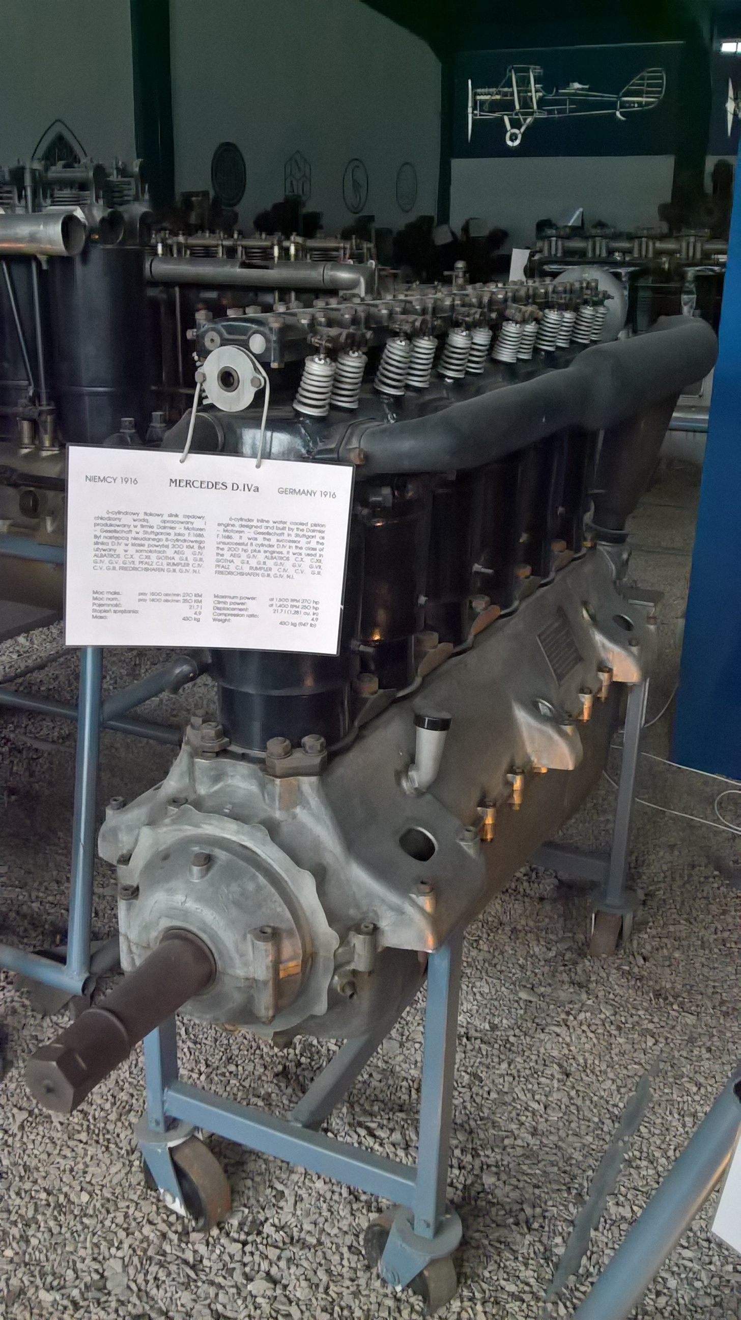 Niemiecki 6-cylindrowy silnik rzędowy Mercedes D.IVa z 1916 r., eksponowany w Muzeum Lotnictwa Polskiego w Krakowie.